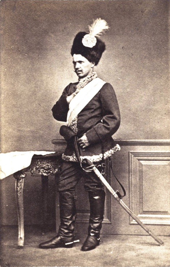 Teodor Cieszkowski (1833-1863) - Polish upriser.